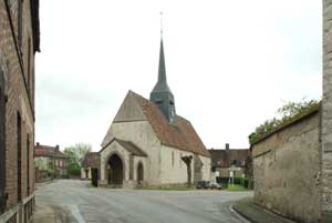 Le Bignon Mirabeau, Loiret, Centre-Val de Loire, France